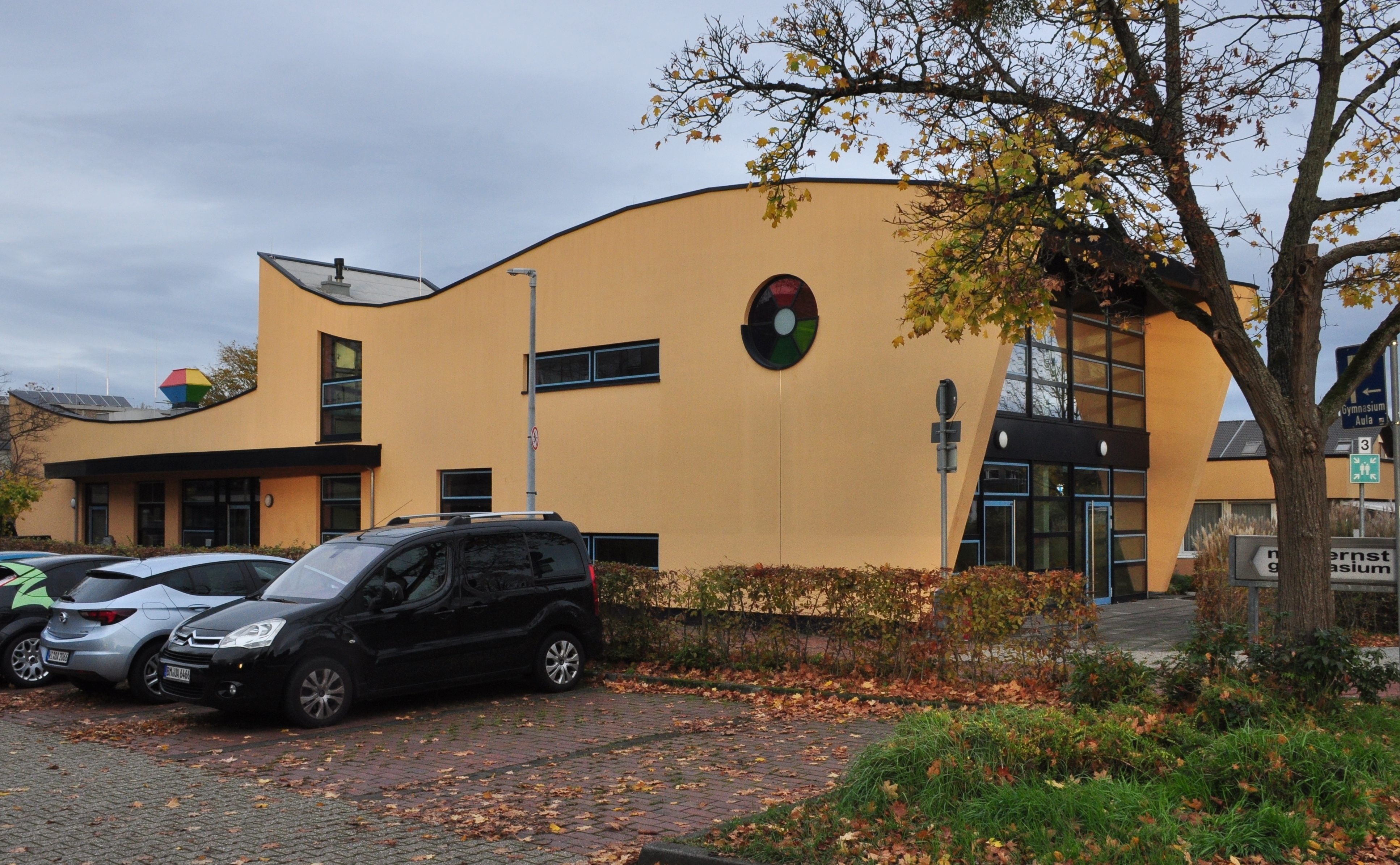 Max-Ernst-Gymnasium, Rodderweg 66, Brühl (Rheinland): Mensa